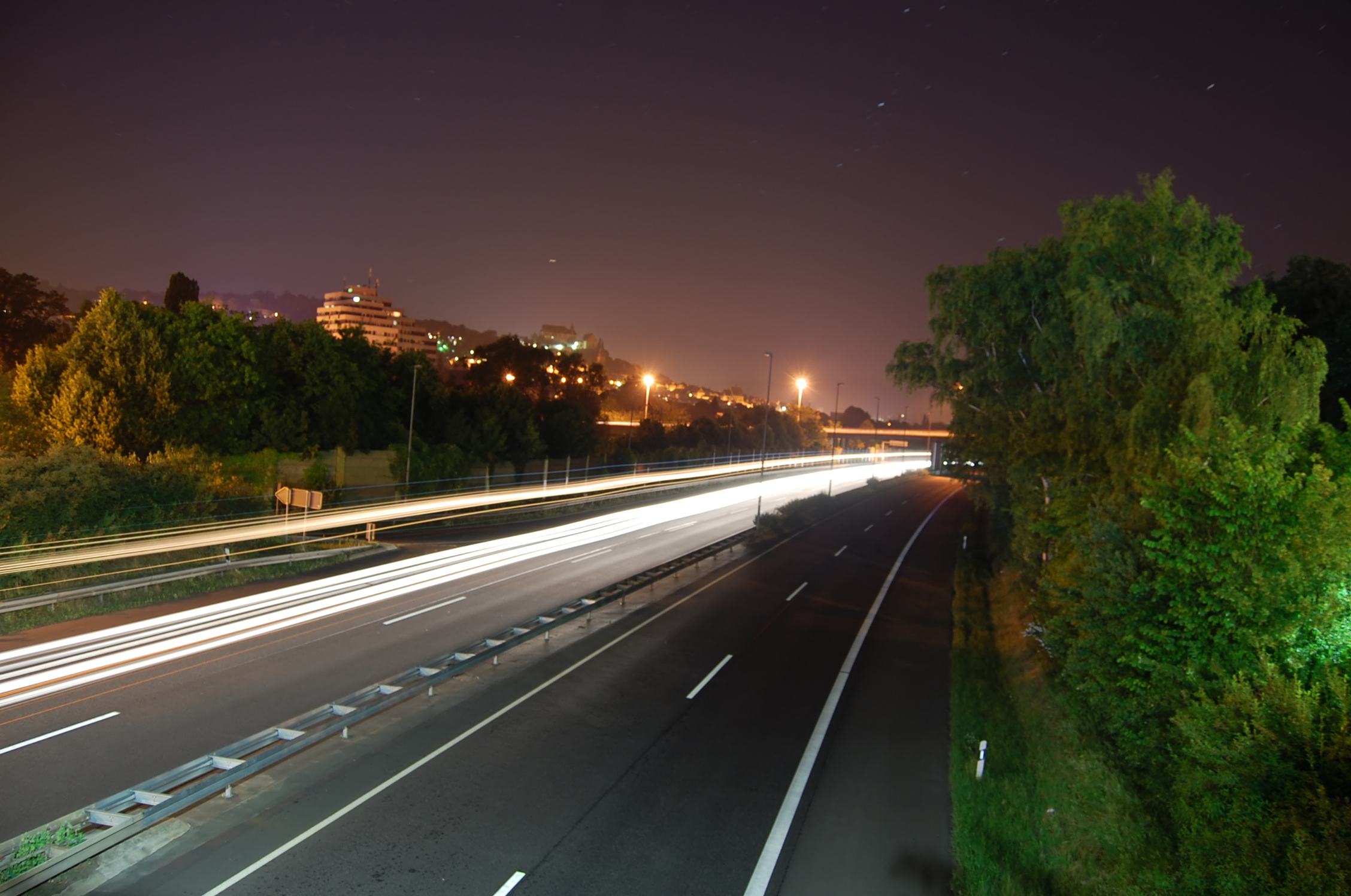 Bundesstraße 3 als autobahnähnlich ausgebaute Straße in Marburg (Lahn)/Hessen